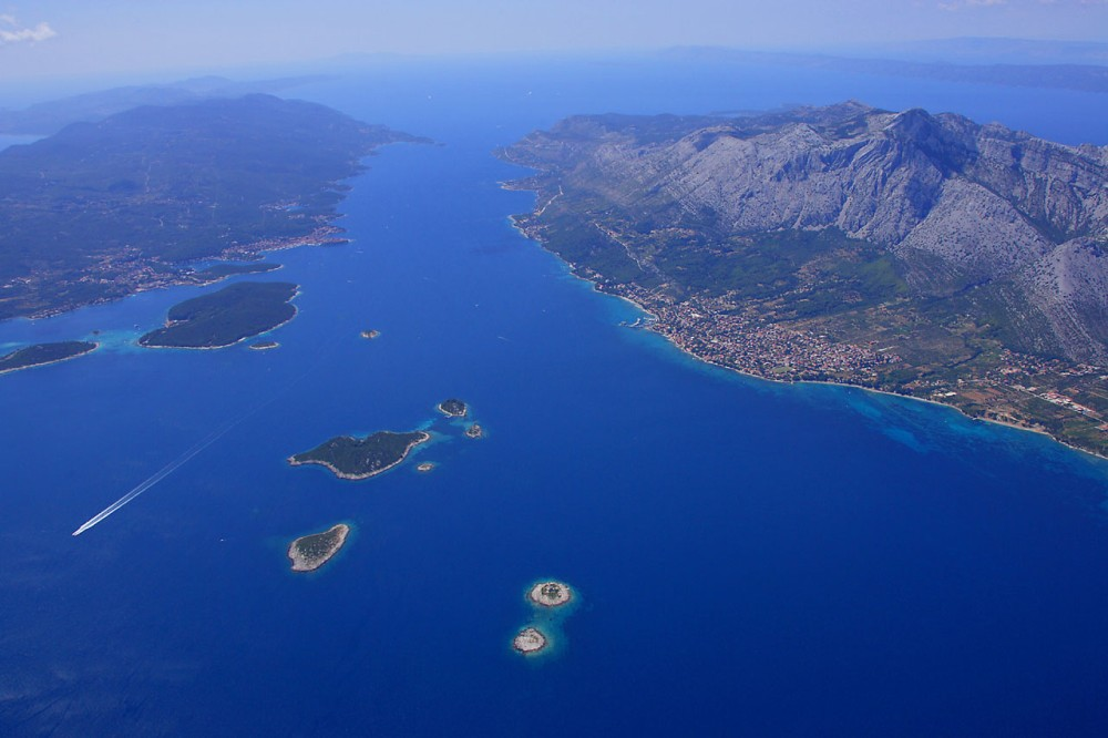 View over Pelješac channel